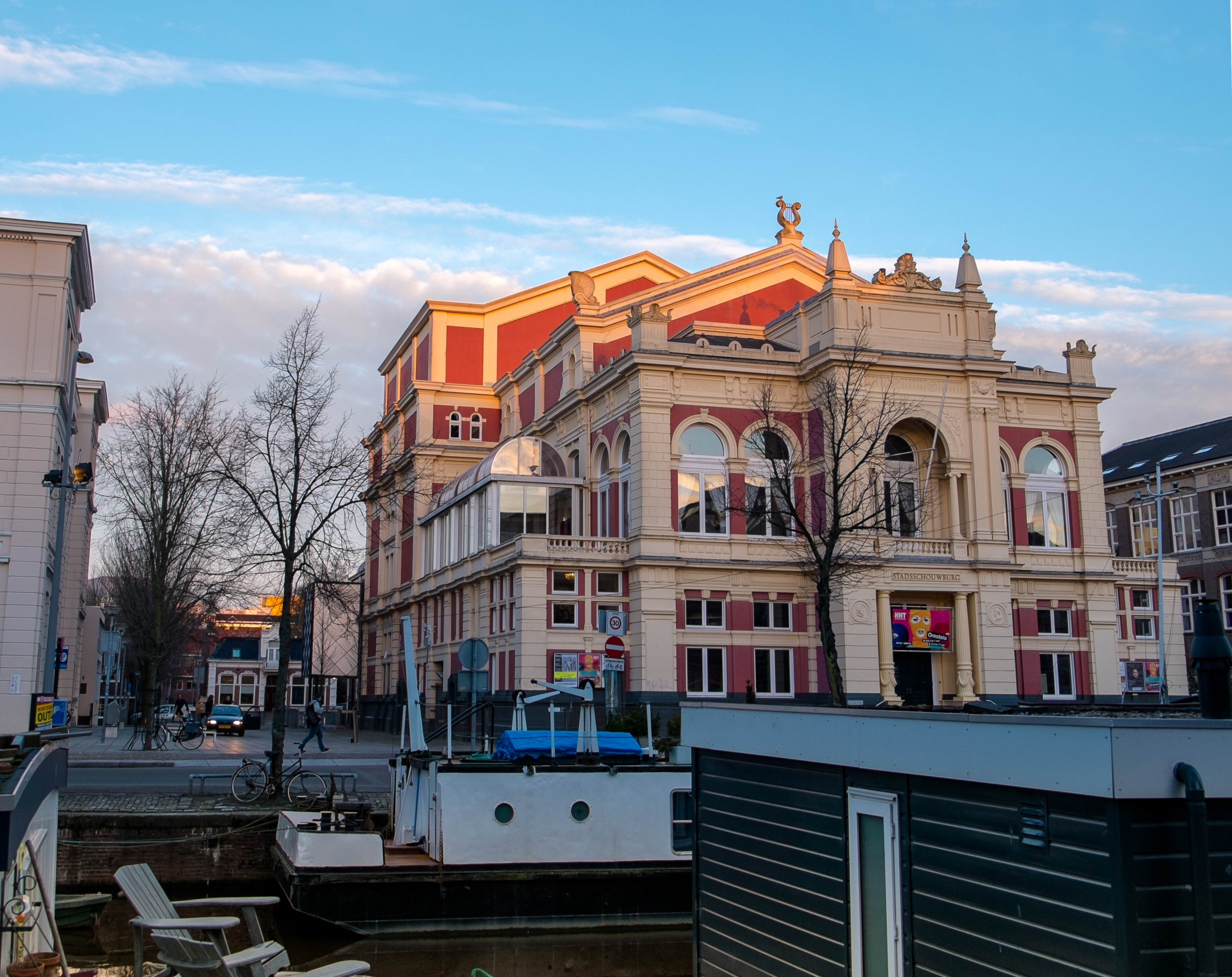 Stadsschouwburg Groningen